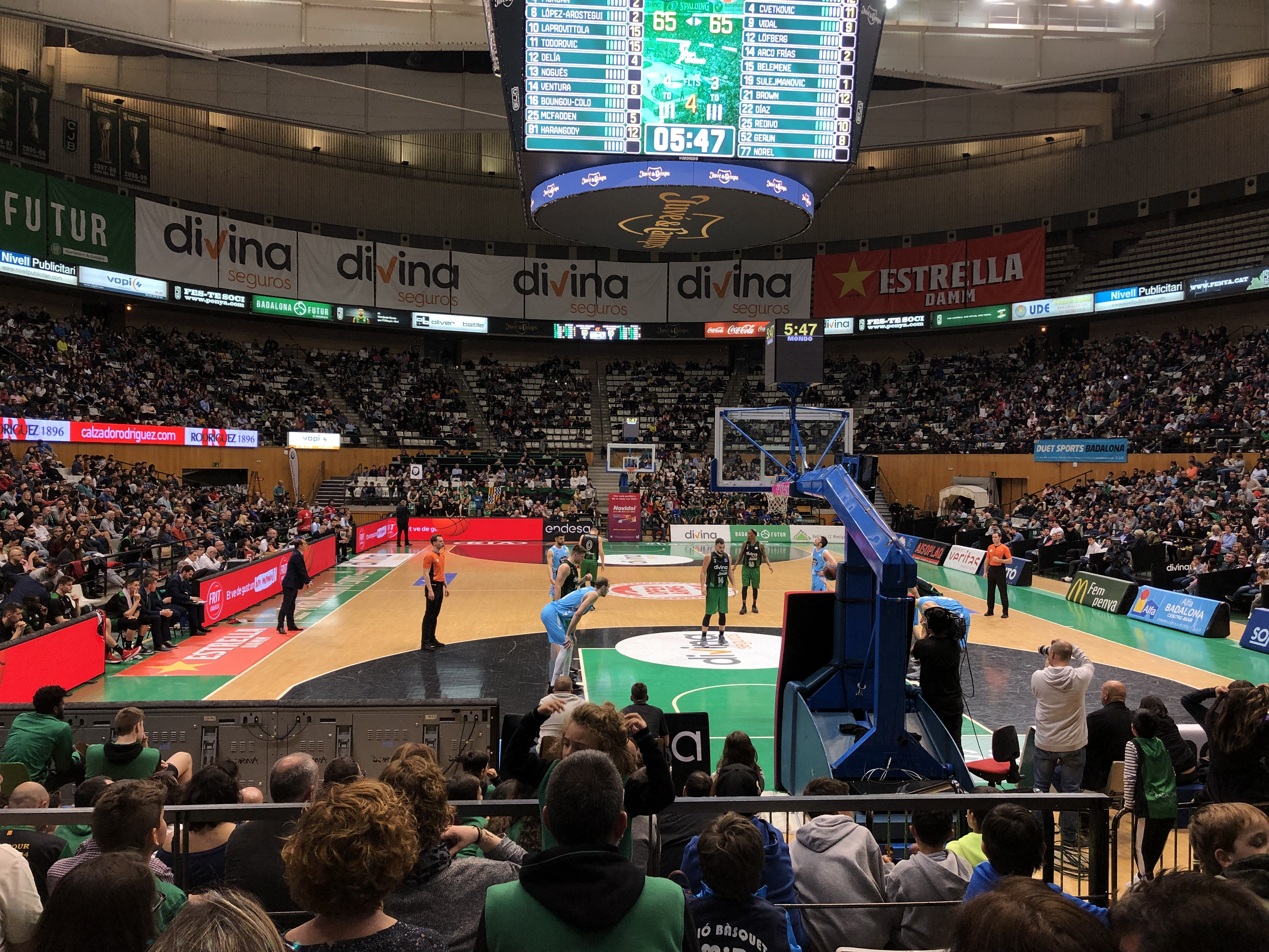 Partit de lliga a l'Olímpic de Badalona entre el Divina Seguros Joventut i el Cafés Candelas Breogán. En aquest partit es va inaugurar el nou videomarcador central.